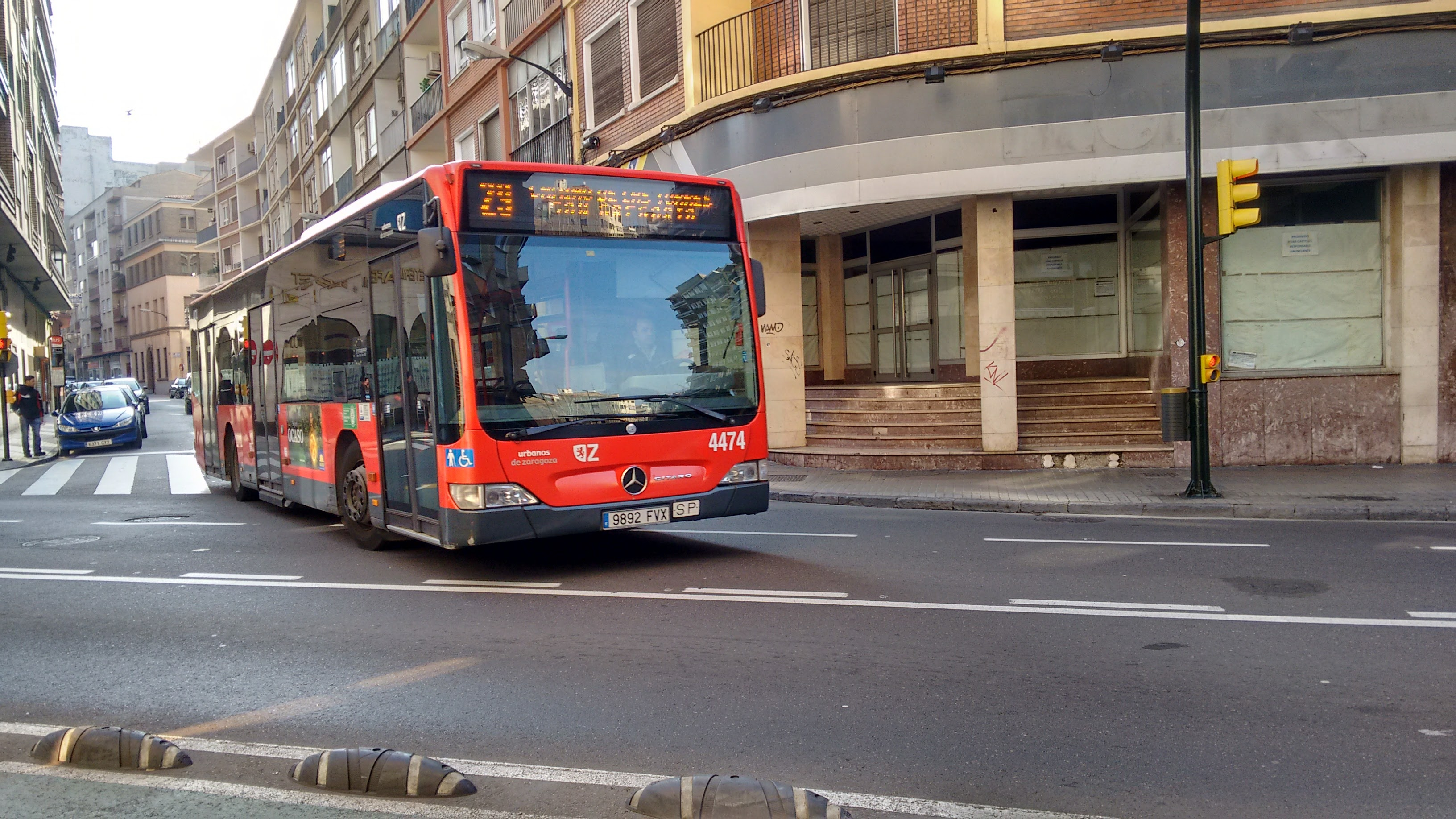 Bus 4474 de Auzsa, prestando servicio en la línea 29